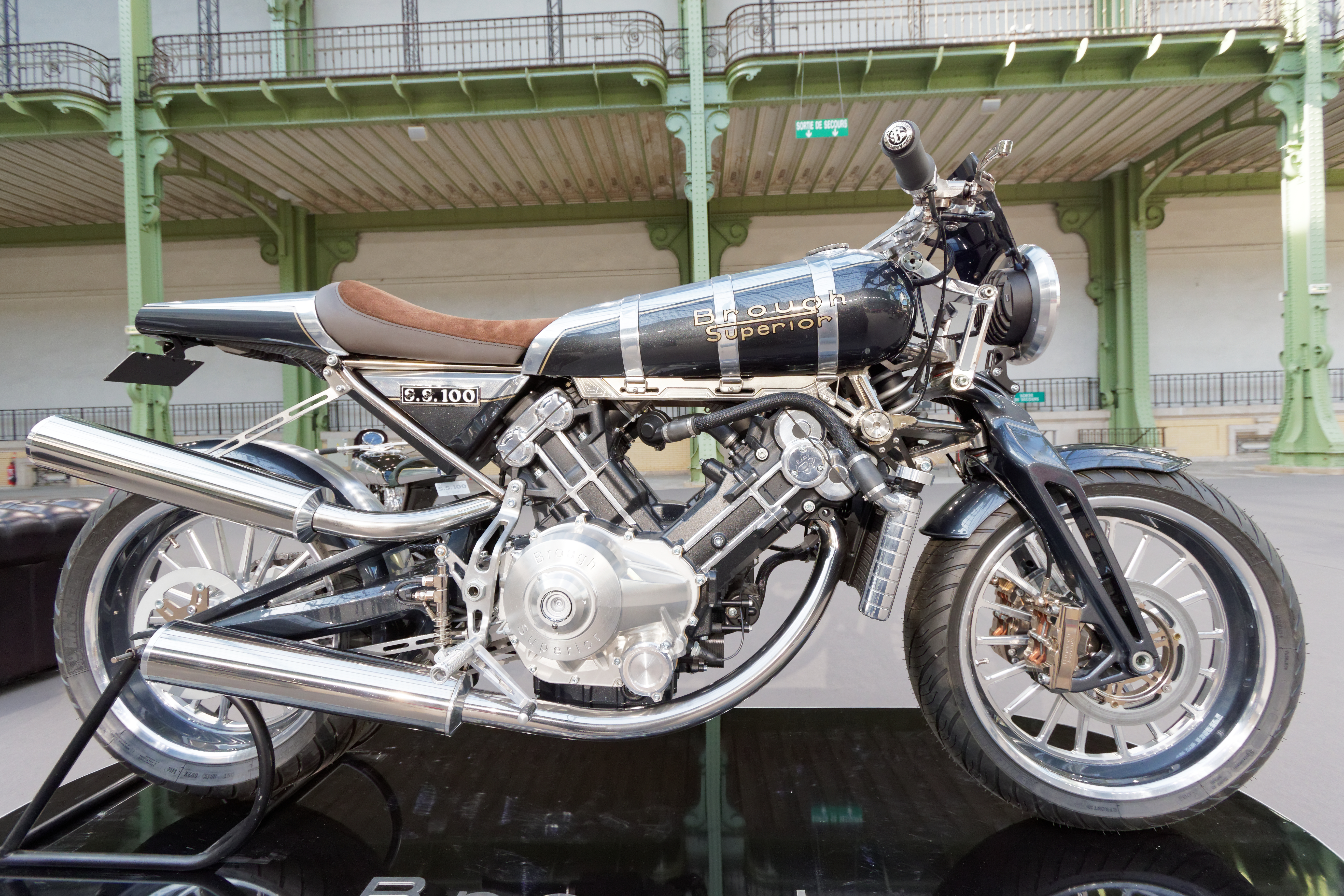 Un des véhicules présenté lors de la vente aux enchères Bonhams 2015 au Grand Palais de Paris.